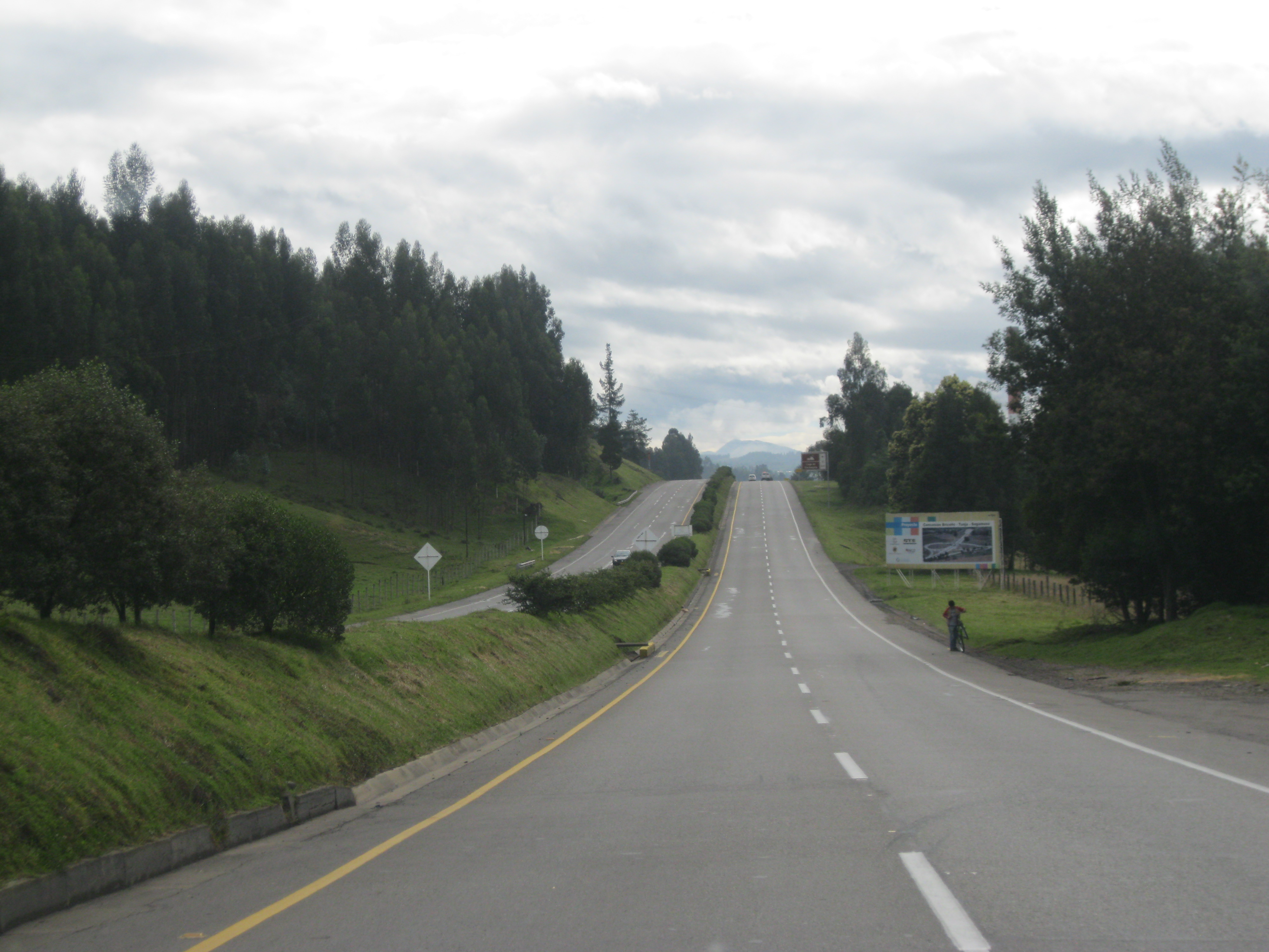 Ruta Nacional 55 entre Tunja y Duitama